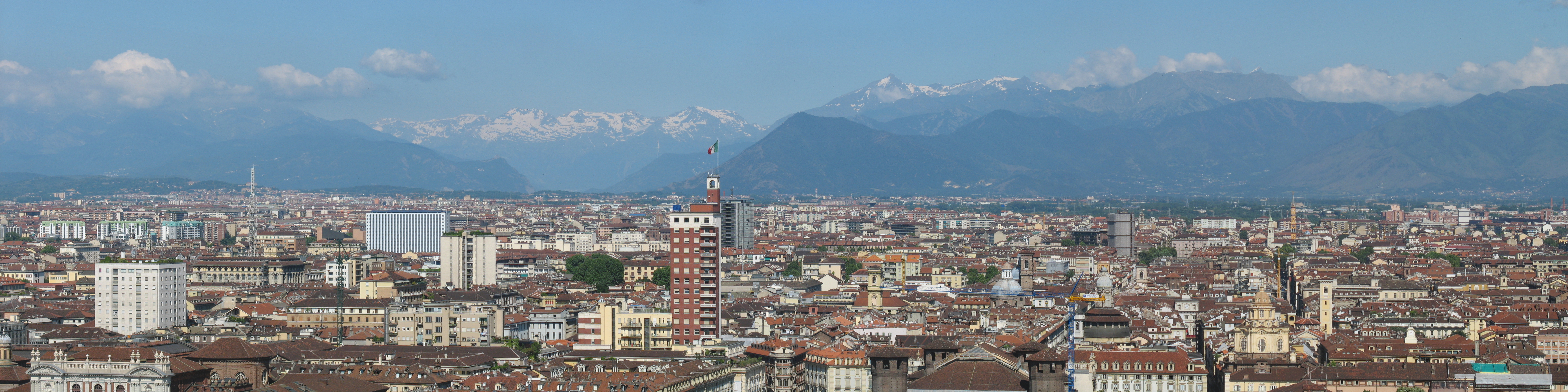 Susa Valley seen from Mole Antonelliana in Torino.